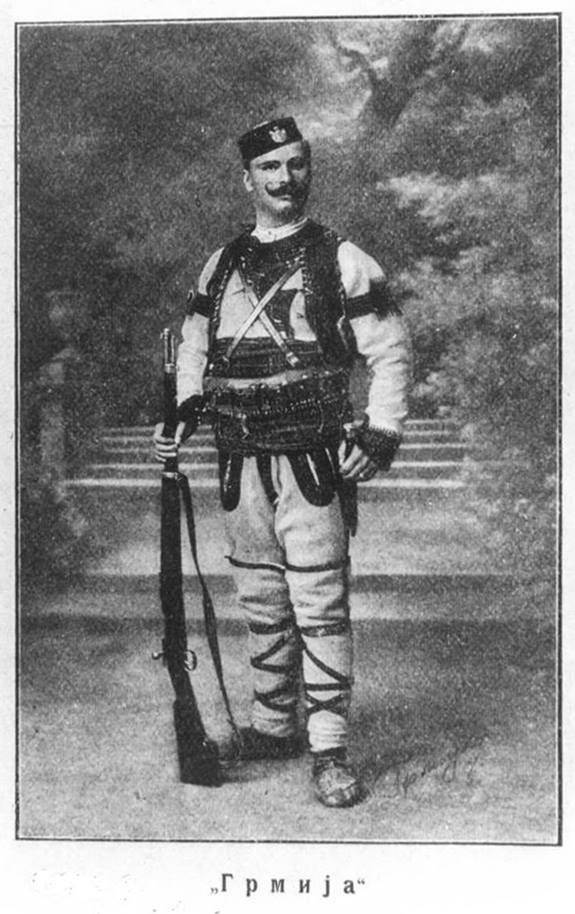 Сава Петровић Грмија (1882—1914), српски официр и четник, четнички војвода и шеф горског штаба у време борбе за Македонију на почетку 20. века.